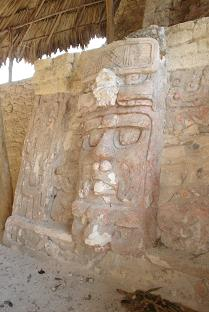 Mascaron